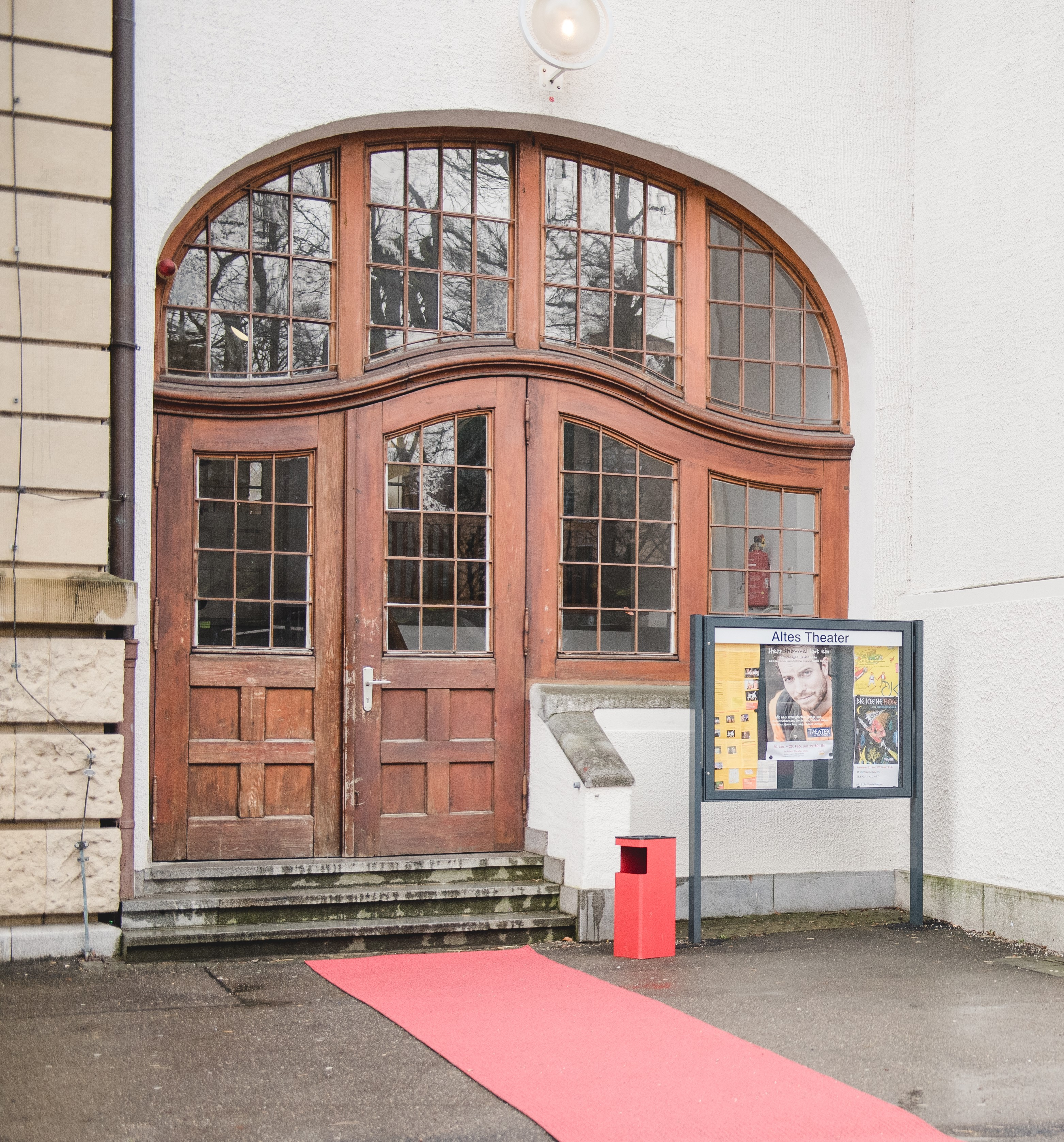 Haupteingang der Jungen Ulmer Bühne